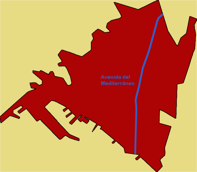 Mapa situación Avenida del Mediterráneo en Almería